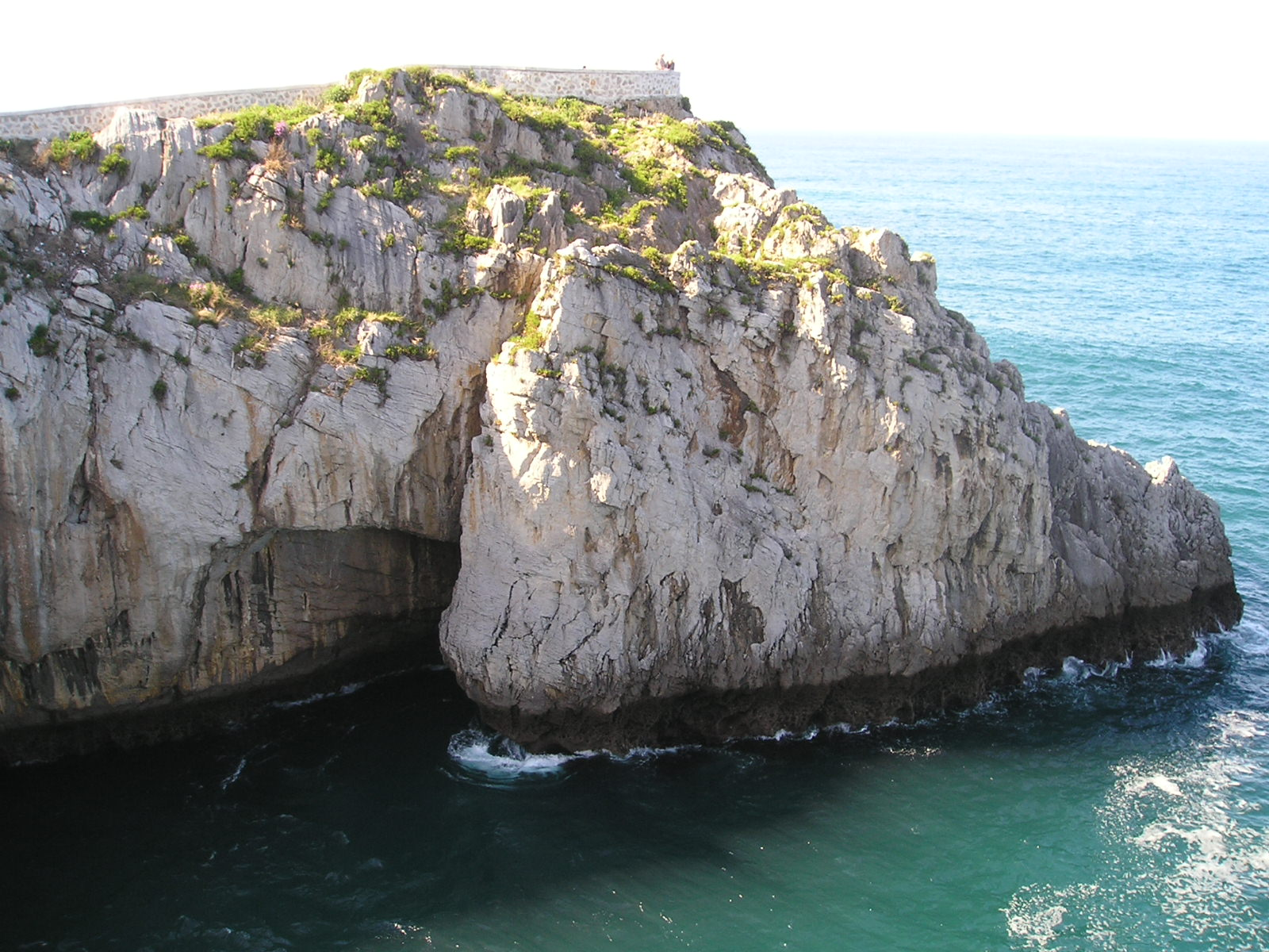 Castro Urdiales, localidad y municipio de Cantabria (España)